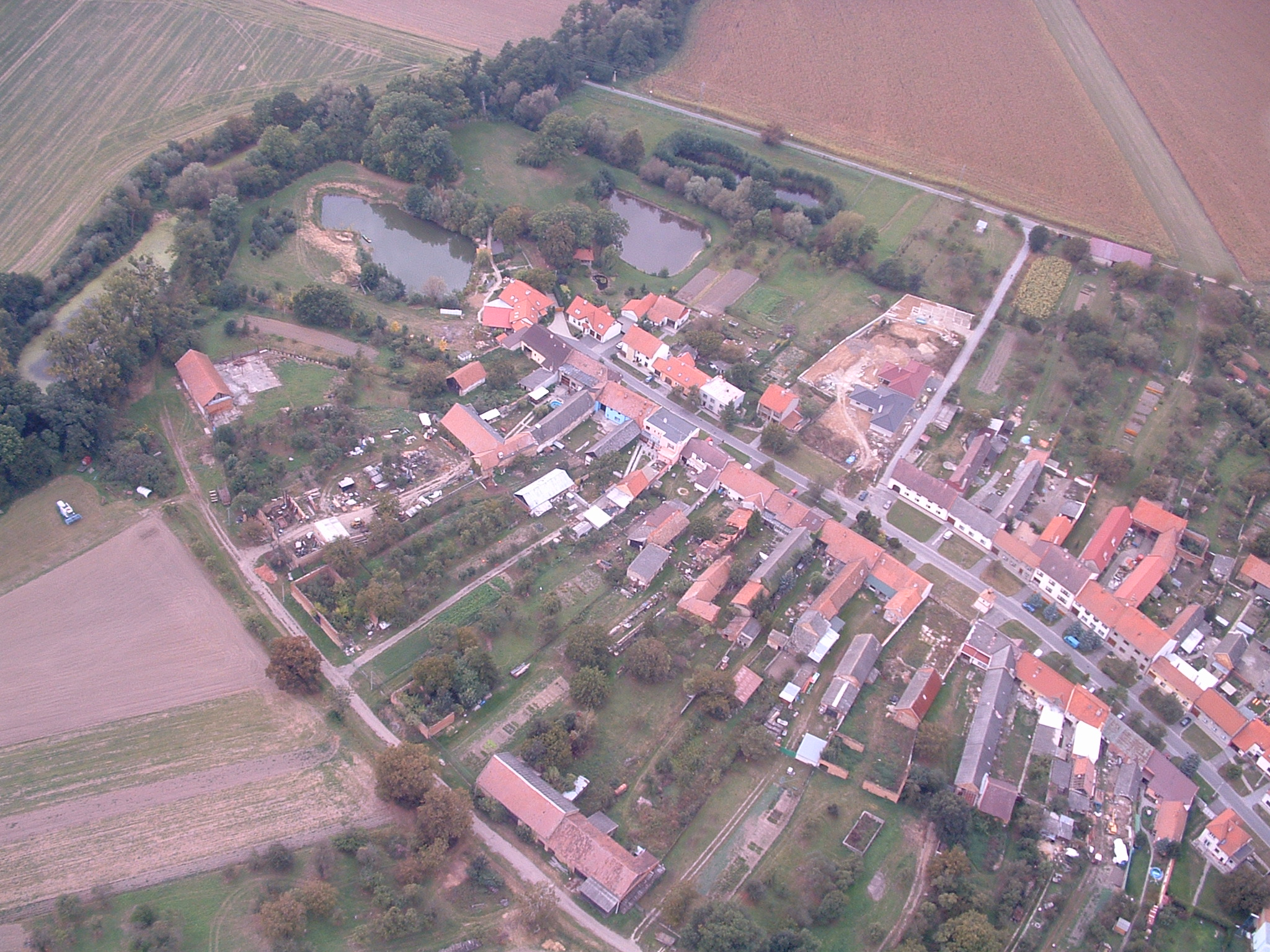 letecký snímek části obce Bílany